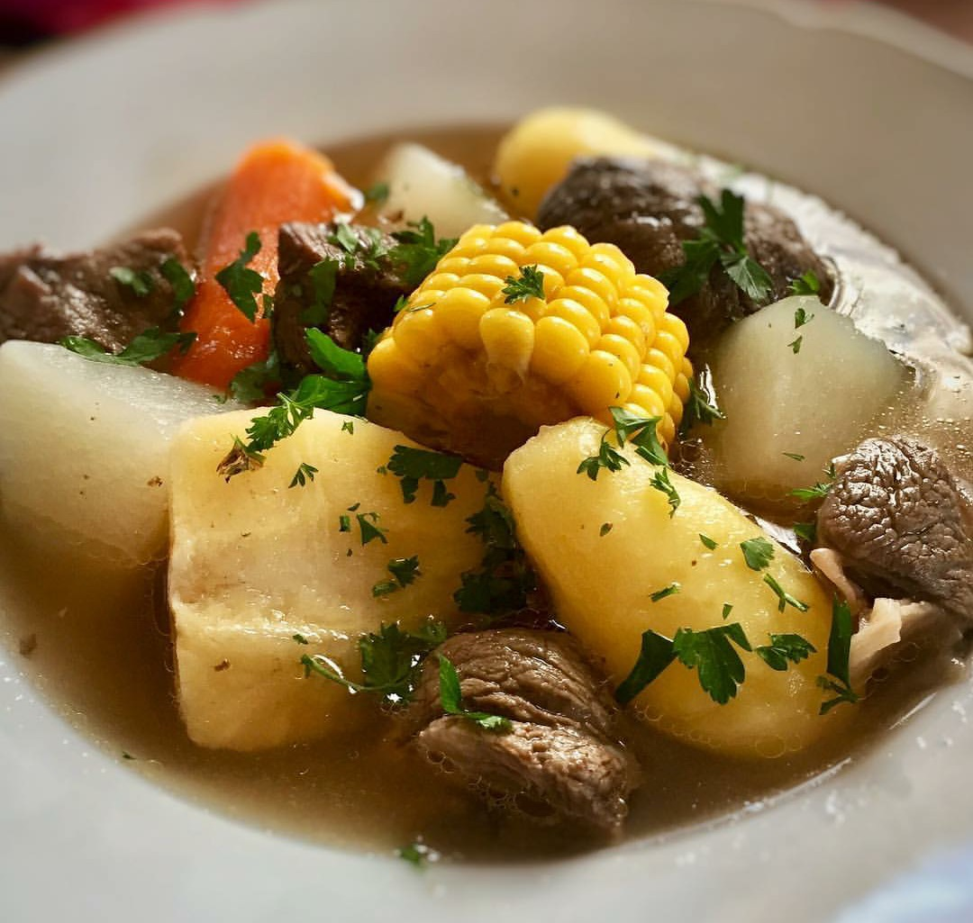 Versión jpg del archivo Archivo:Olla de carne 2.png